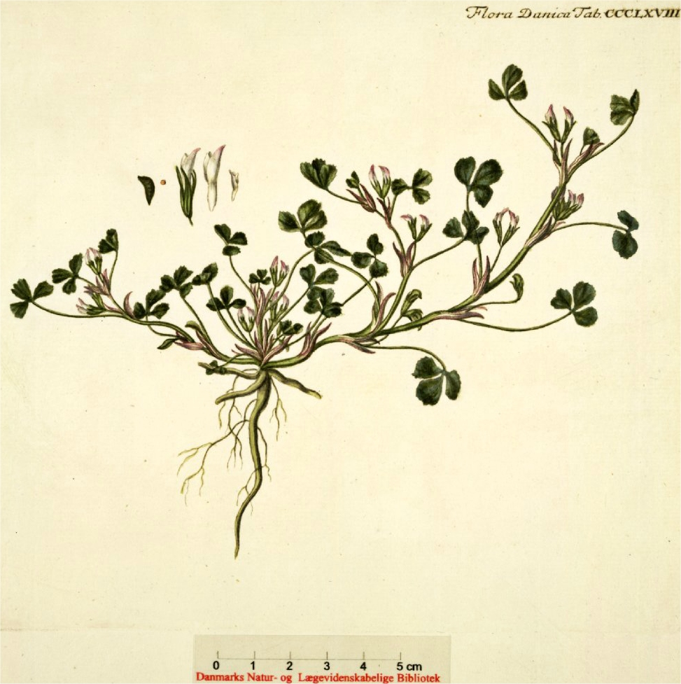 Trifolium ornithopodioides, vogelpootklaver